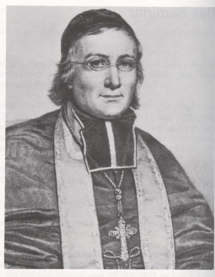 Litho